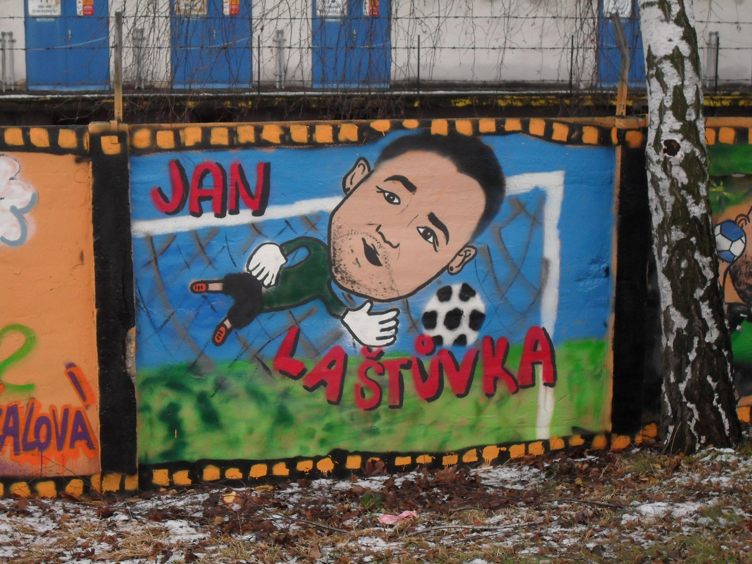 Jan Laštůvka, Street Art Karviná